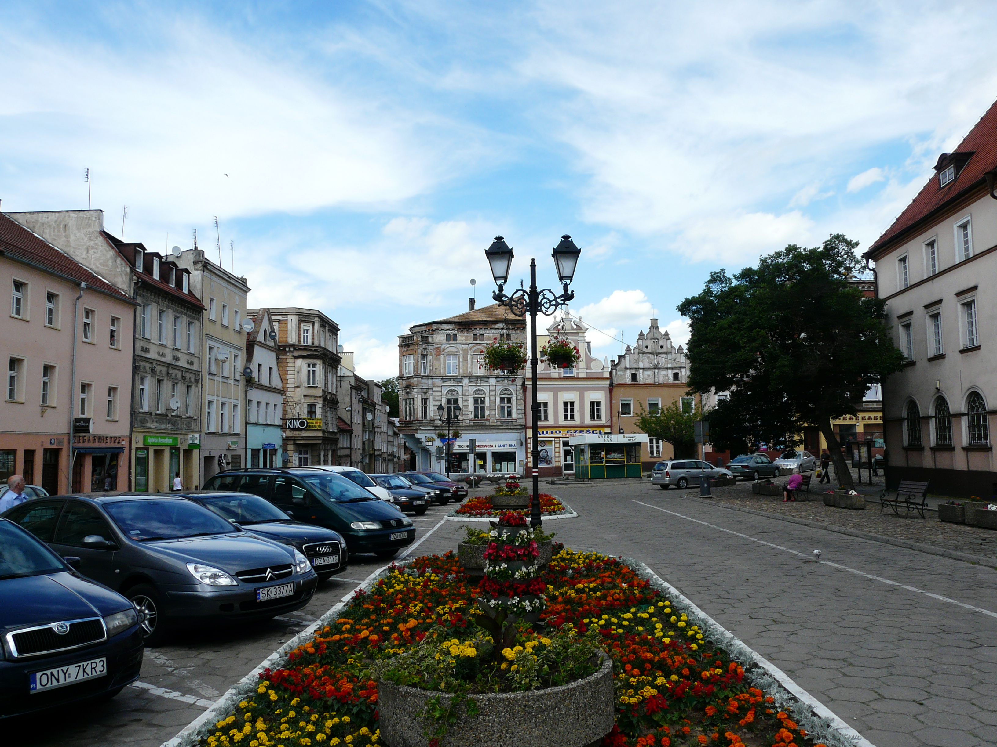 Domy na náměstí v Paczkowě, v Polsku